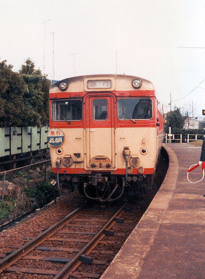 国鉄小松島駅を発車した小松島港行快速列車（徳島まで急行よしの川）